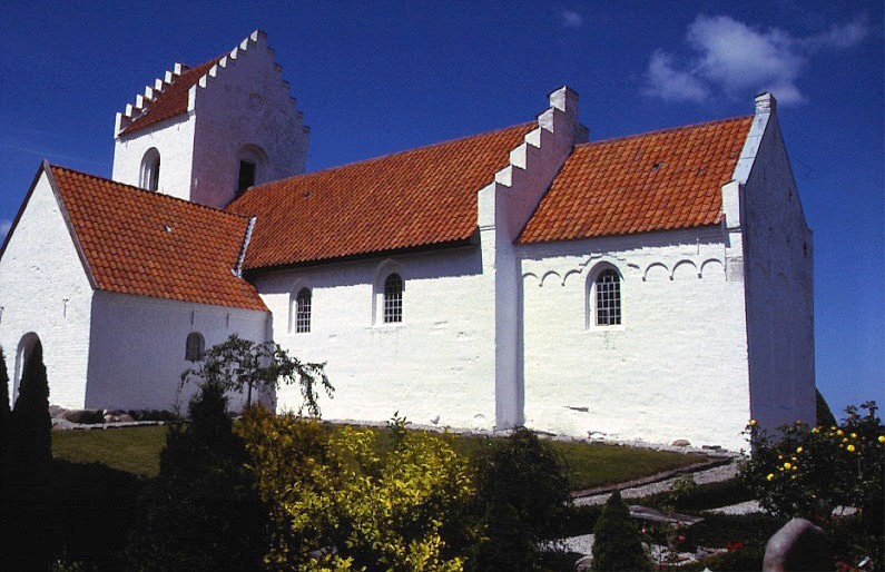 Enslev Kirke i Danmark. Enslev kirke